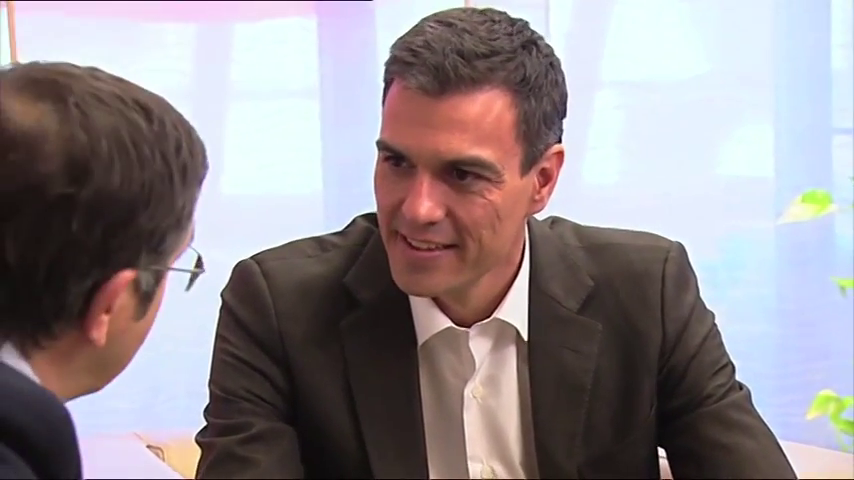 Encuentro entre Patxi López y Pedro Sánchez